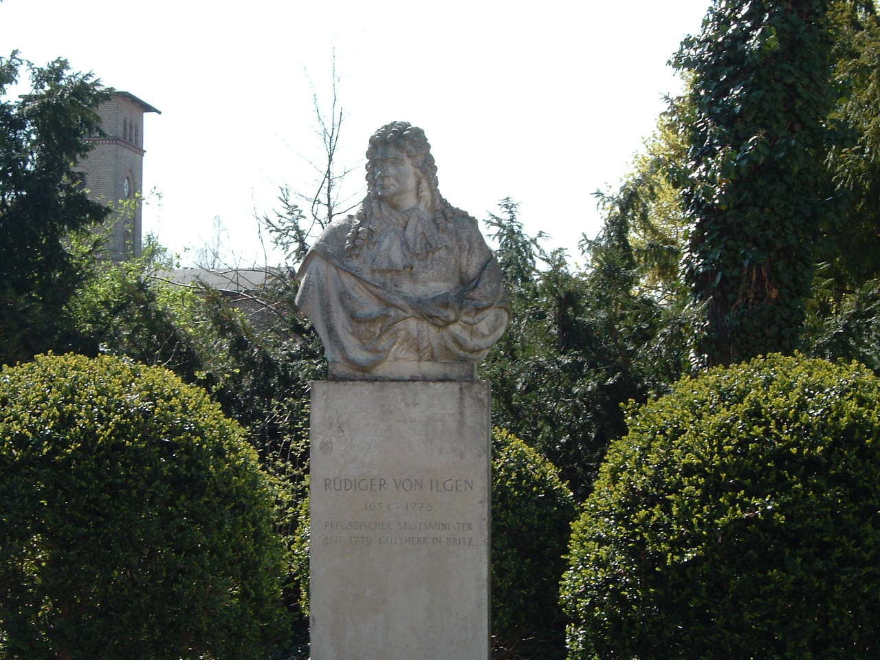 Büste Rüdiger von Ilgen 1654 - 1728 Preussischer Staatsminister